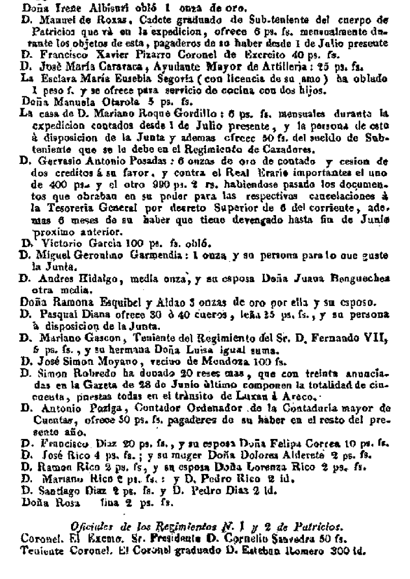 Lista de suscriptores al fondo de apoyo para la creación del primer ejército auxiliar a las provincias interiores (3)